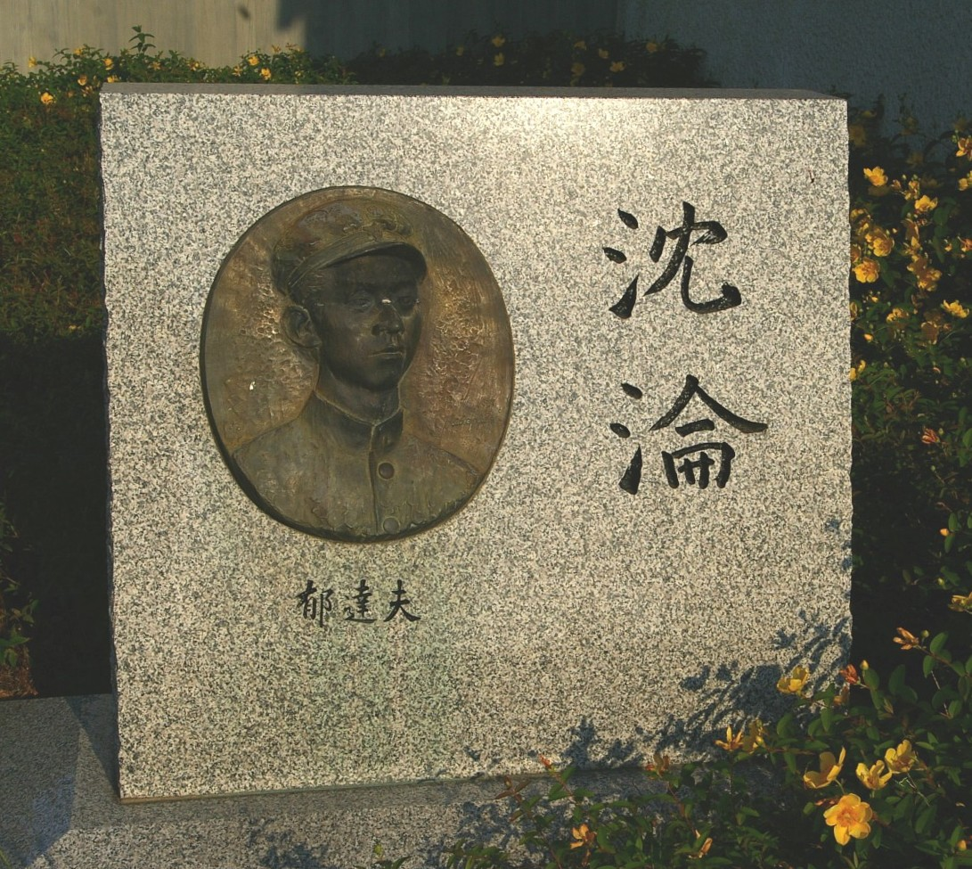 愛知県名古屋市 一般公衆に開放されている屋外の場所、または一般公衆の見やすい屋外の場所に、著作権者またはその許諾を受けた者によって恒常的に設置されている、美術の著作物の原作品である。